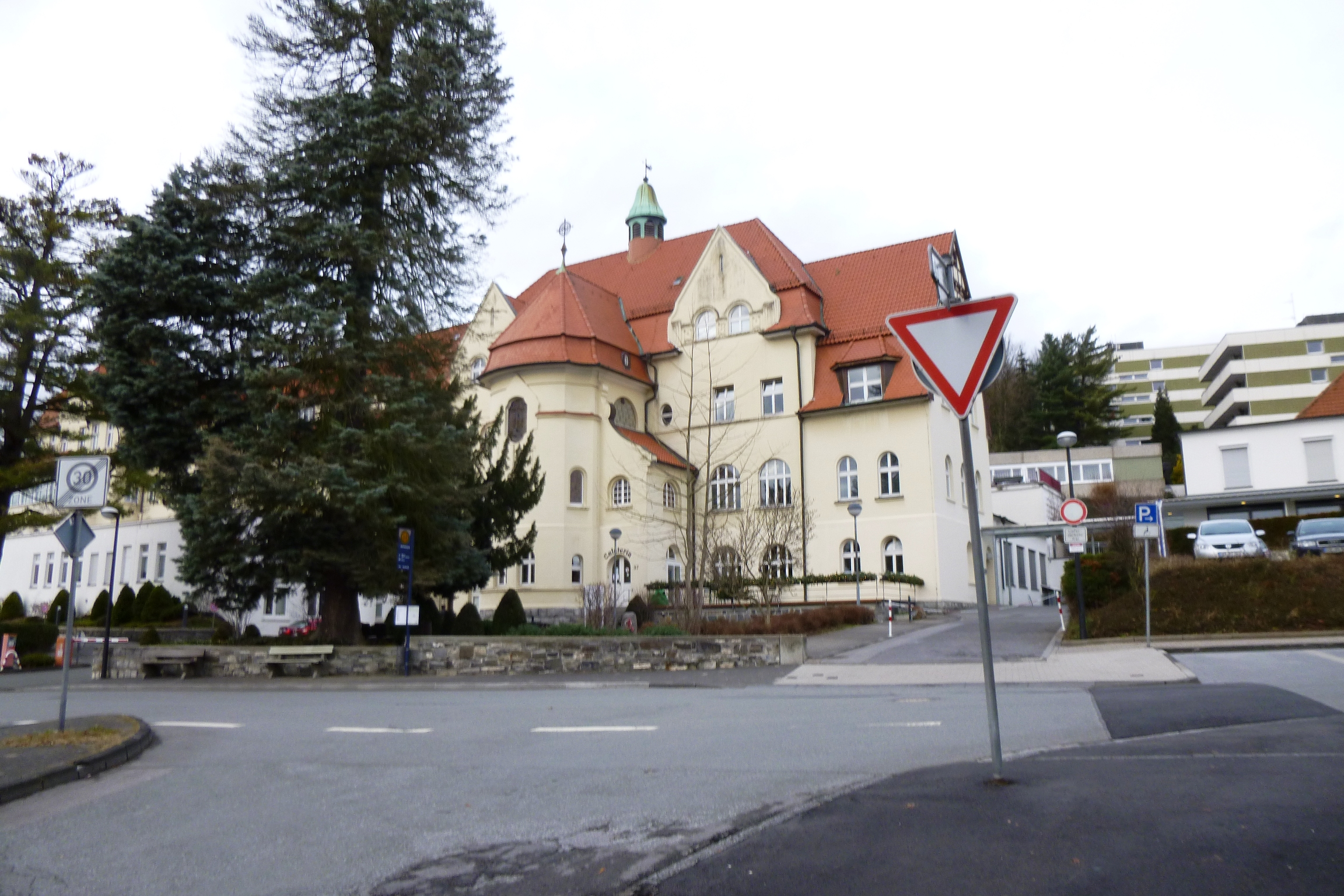 Östlicher Teil des Marienhospitals in Arnsberg mit Kapelle